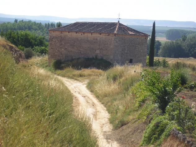 Ermita de San Juan, en San Martín de Rubiales (Burgos, España)